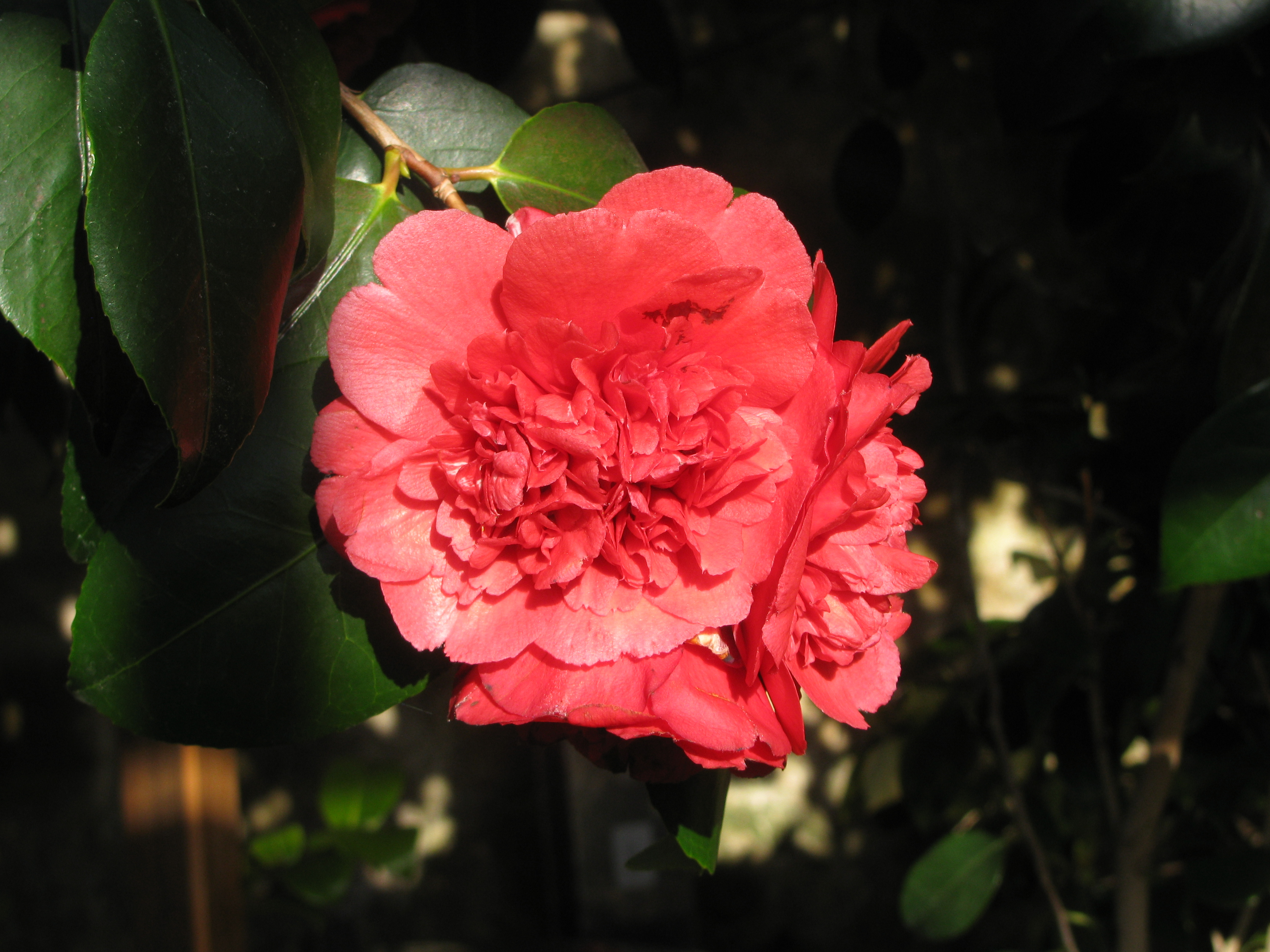 Camellia 'Althaeiflora' in Königsbrück, Saxony